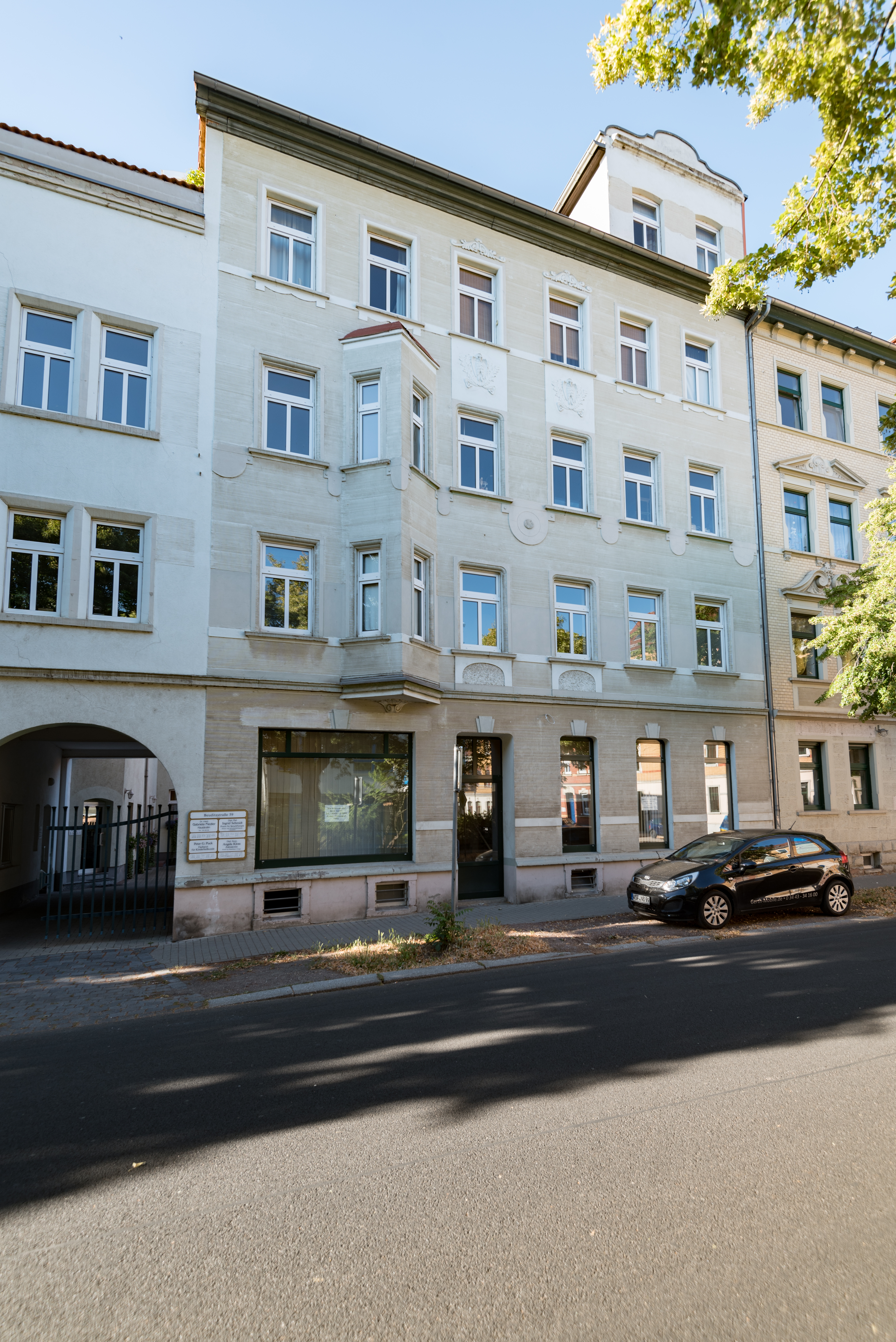 Weißenfels, Beuditzstraße 57